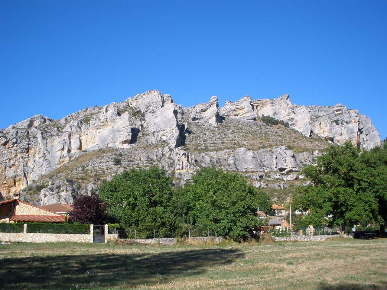 Hoyos del Tozo (Burgos): vistas del pueblo y su paraje natural, en el curso alto del Rudrón